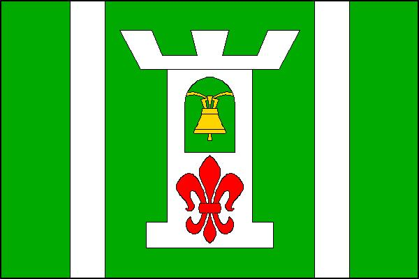 Vlajka obce Kupařovice